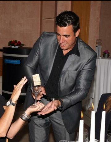 Olivier Macia magicien plus connu sous le nom d'Olmac